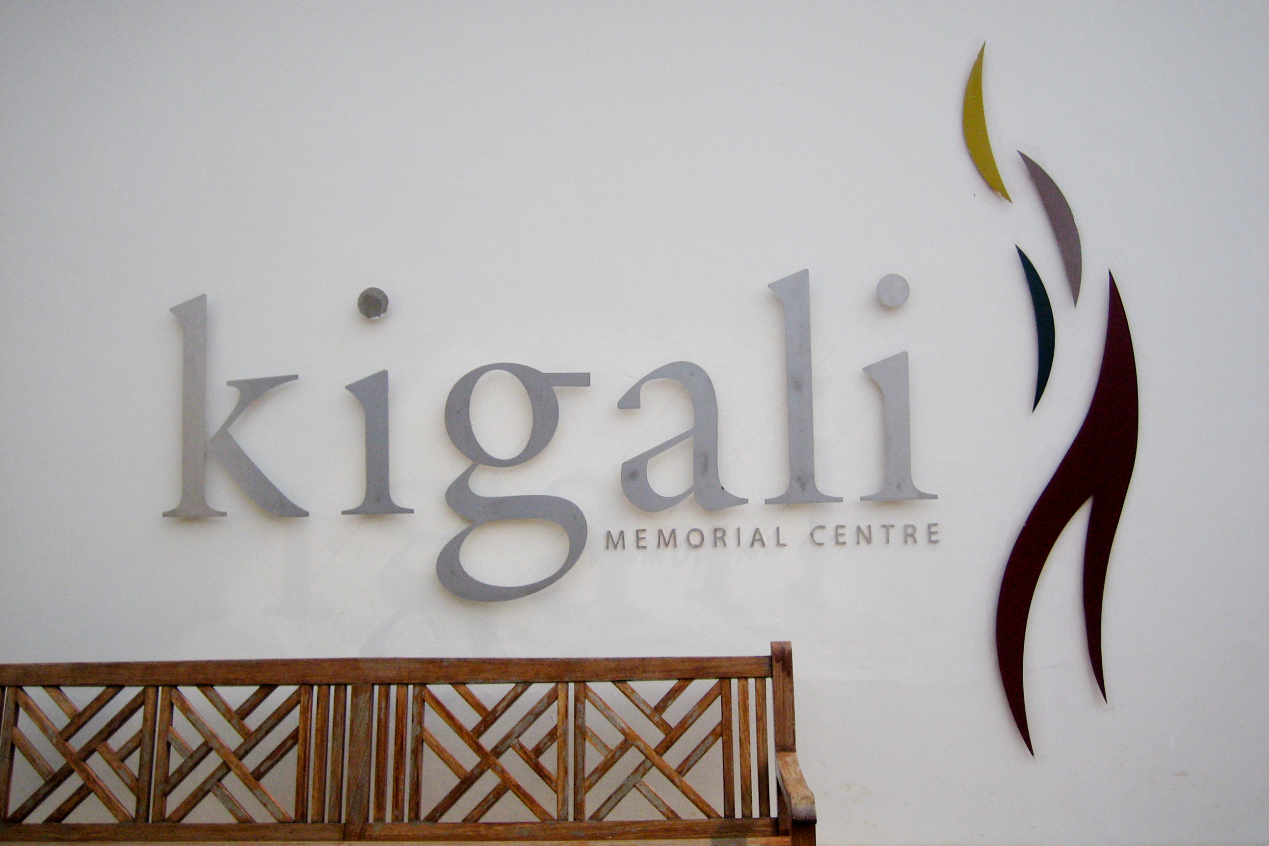 Kigali Memorial Centre, Gisozi.